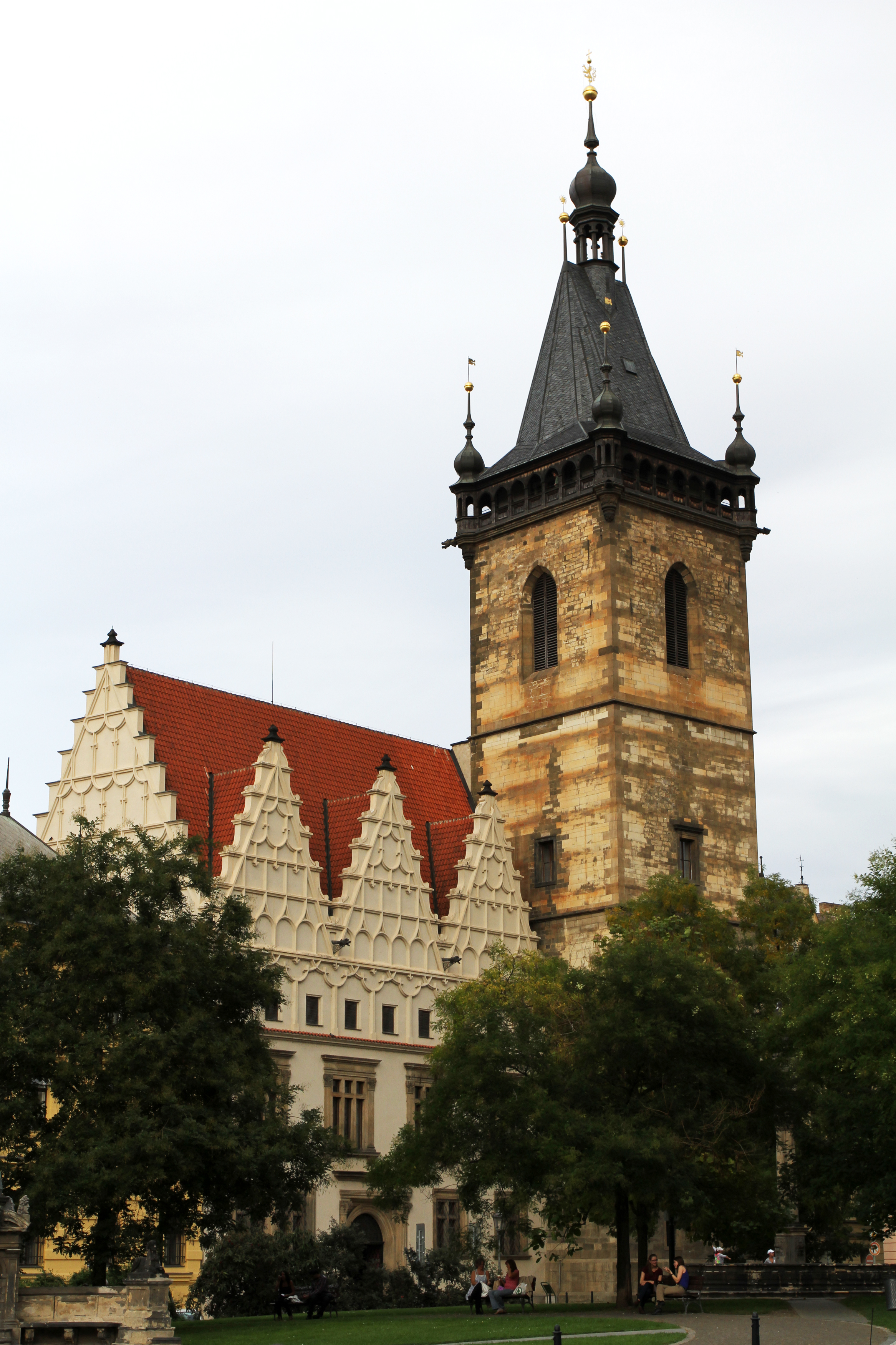 Radnice Novoměstská (Nové Město), Praha 2, Karlovo nám. 1/23, Nové Město